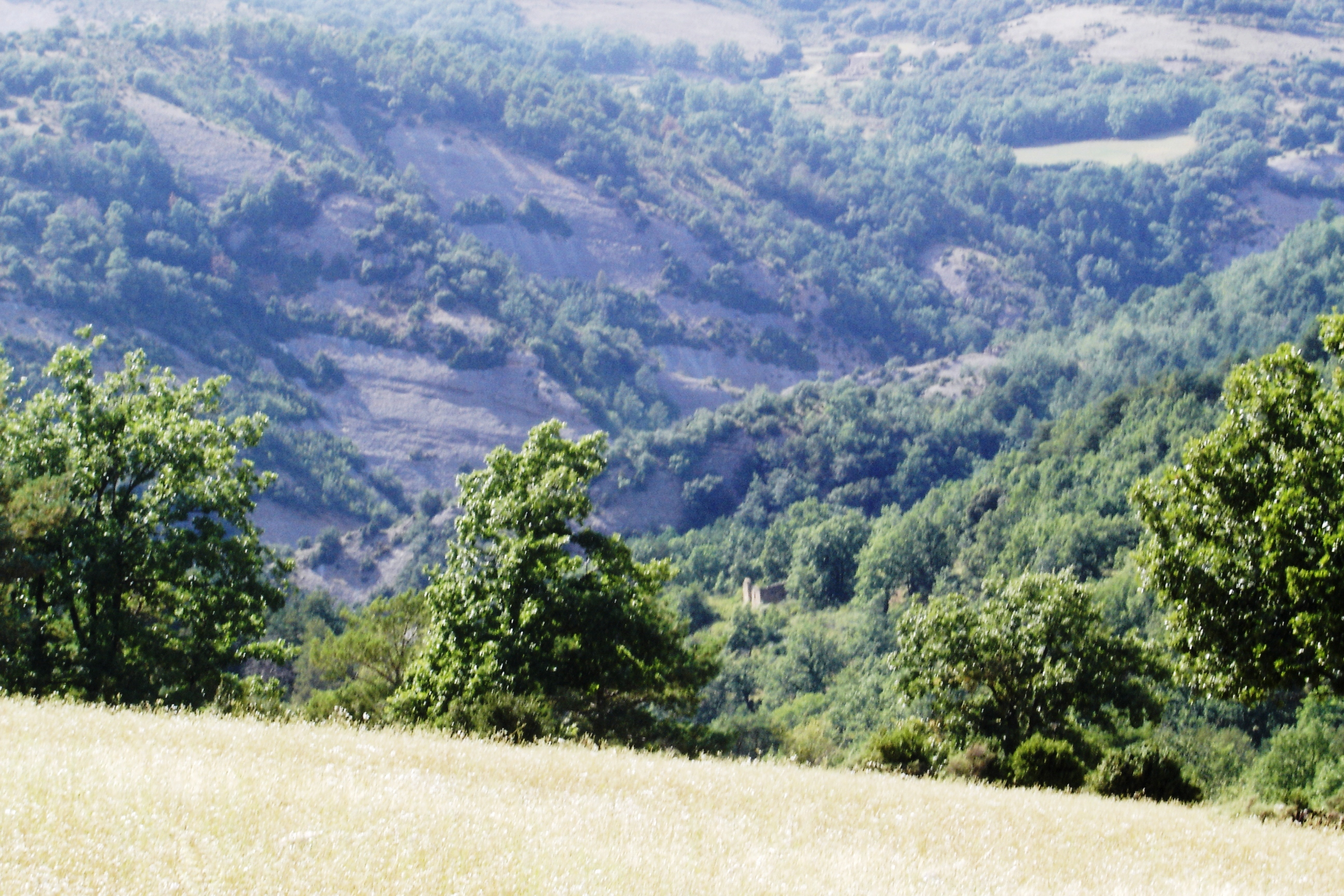 El tram final de la rasa. Al fons la cinglera sota la qual hi ha la confluència amb la riera de Canalda. Ala centre de la foto, les runes de la masia d'Encies Baixes.